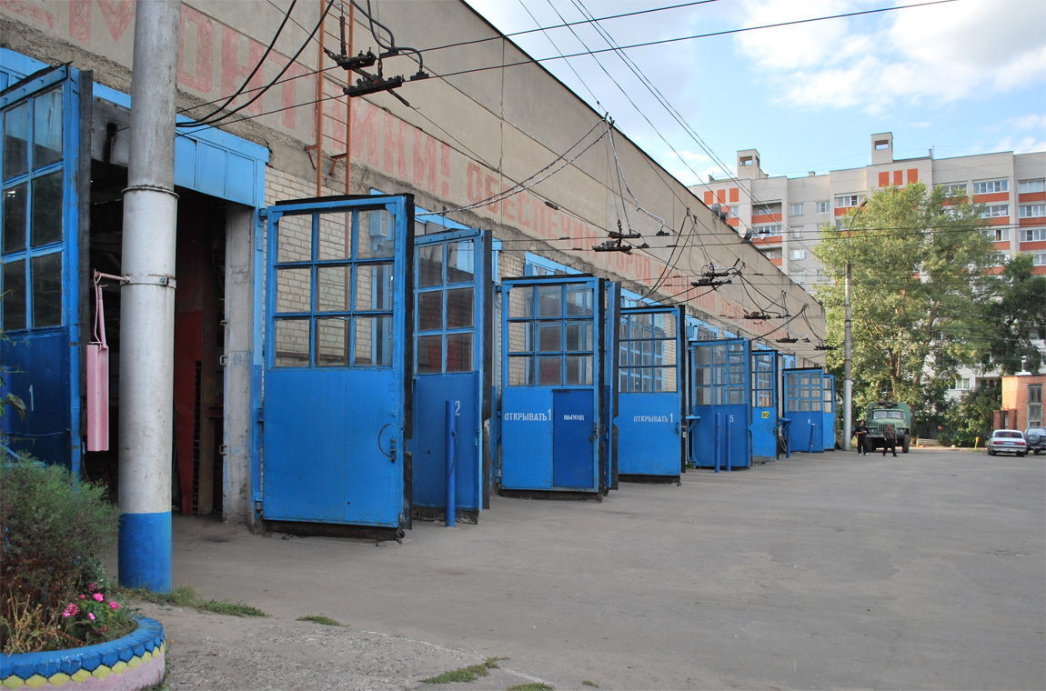 Троллейбусное депо №2 в воронеже